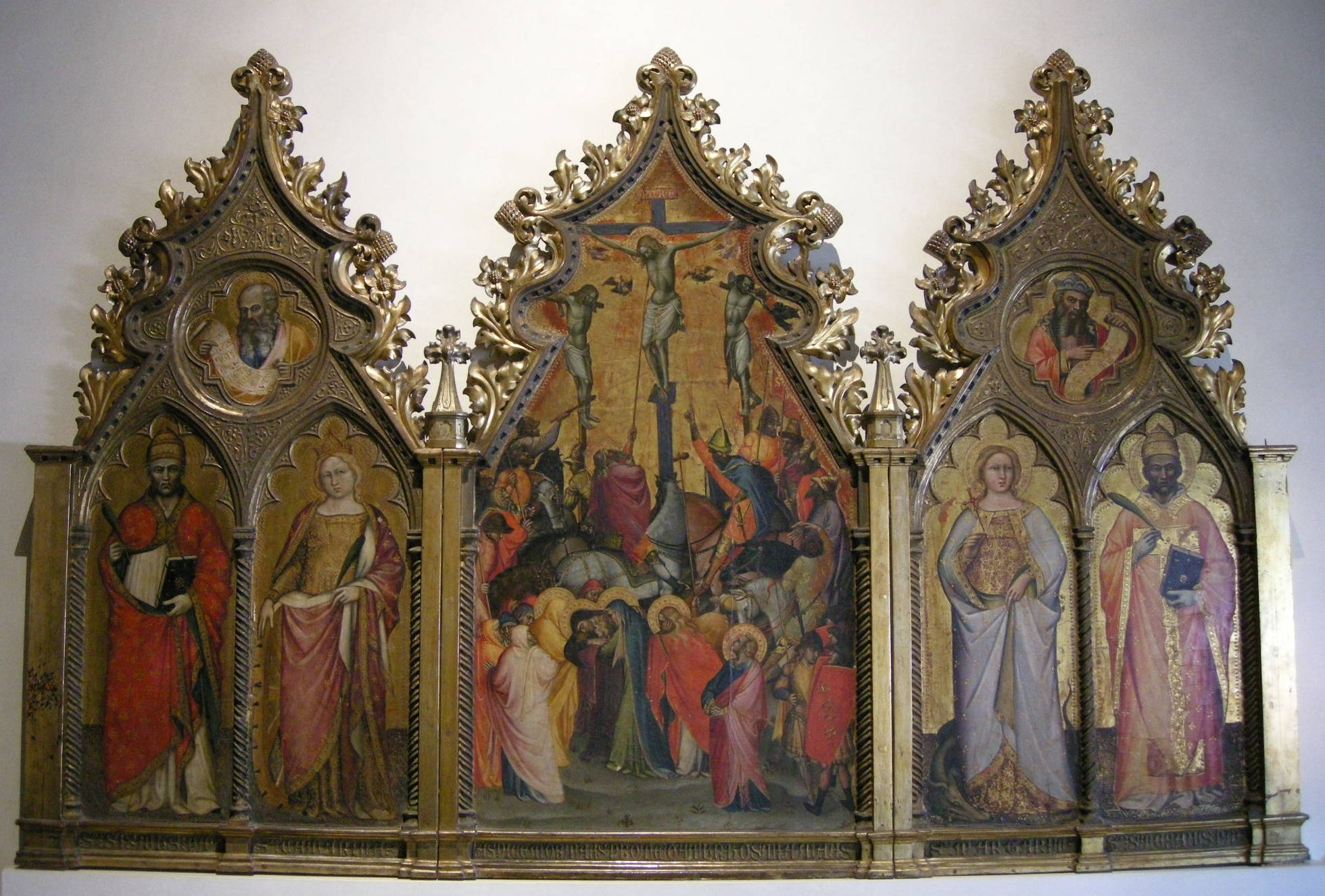 Spinello aretino, crocefissione e santi sisto papa, caterina d'alessandria, margherita e stefano papa) 1395-1400